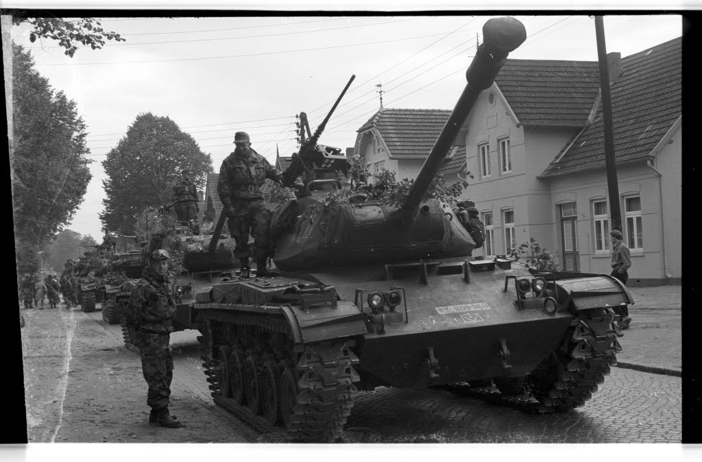 Kampfgruppe A 3 der 3. Panzerdivision mit etwa 100 Panzern und Selbstfahrlafetten, 500 Räderfahrzeugen und rund 3.000 Soldaten im Raum Trittau und Neumünster. Im Bild Panzer vom Typ M 41 in Trittau in Bereitschaftsstellung.